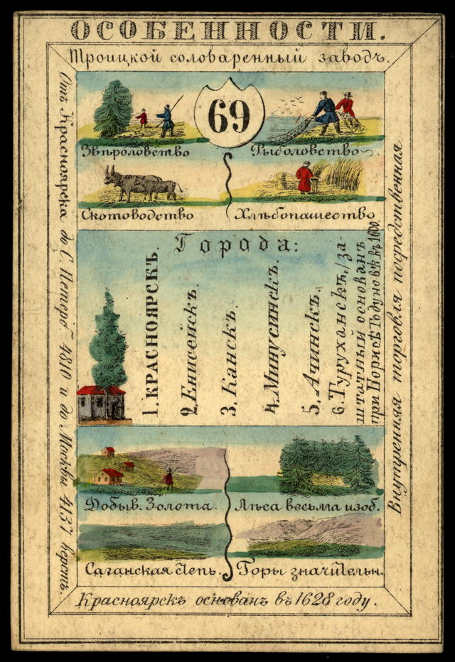 История России. Енисейская губерния на цветных карточках лото - популярной настольной игры XIX-начала XX вв.